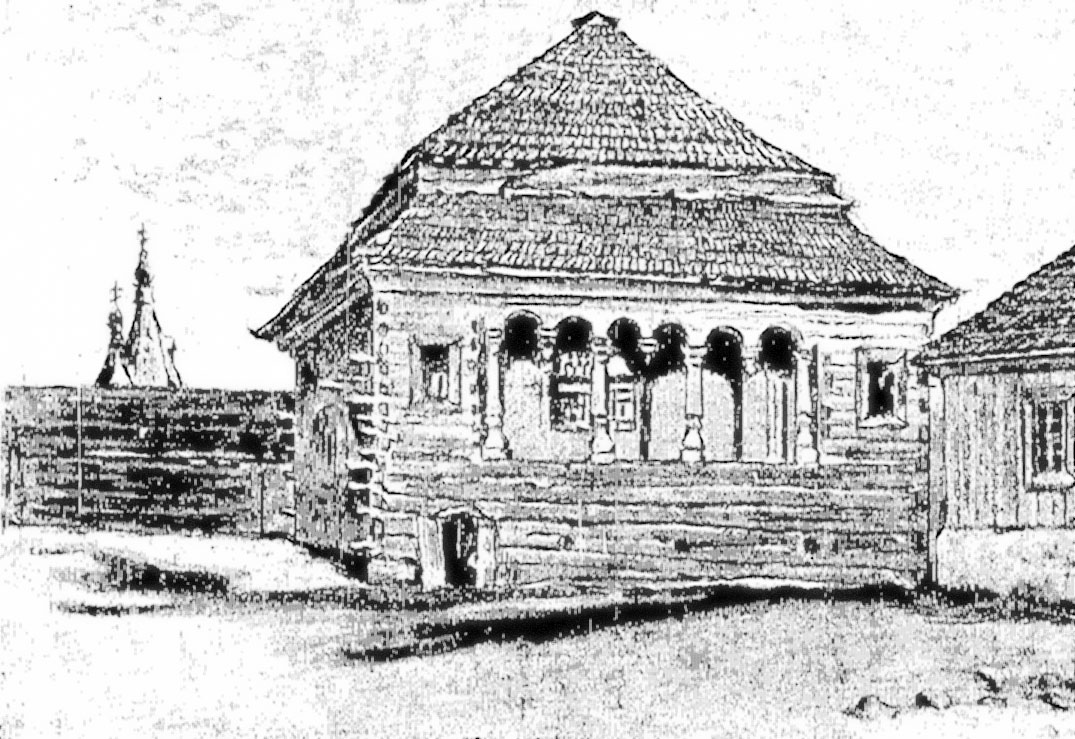 Беларуская (тарашкевіца): Маладэчна (Maładečna). Старая сынагога